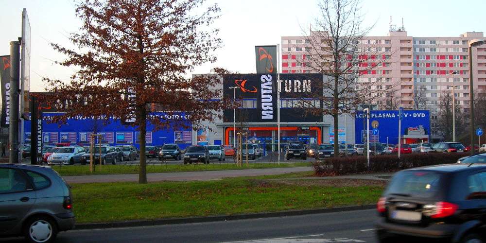 Der neu erbaute Saturn-Markt auf dem ehemaligen Goliath-Gelände, im Hintergrund der renovierte Wohnkomplex "Laubfrosch"